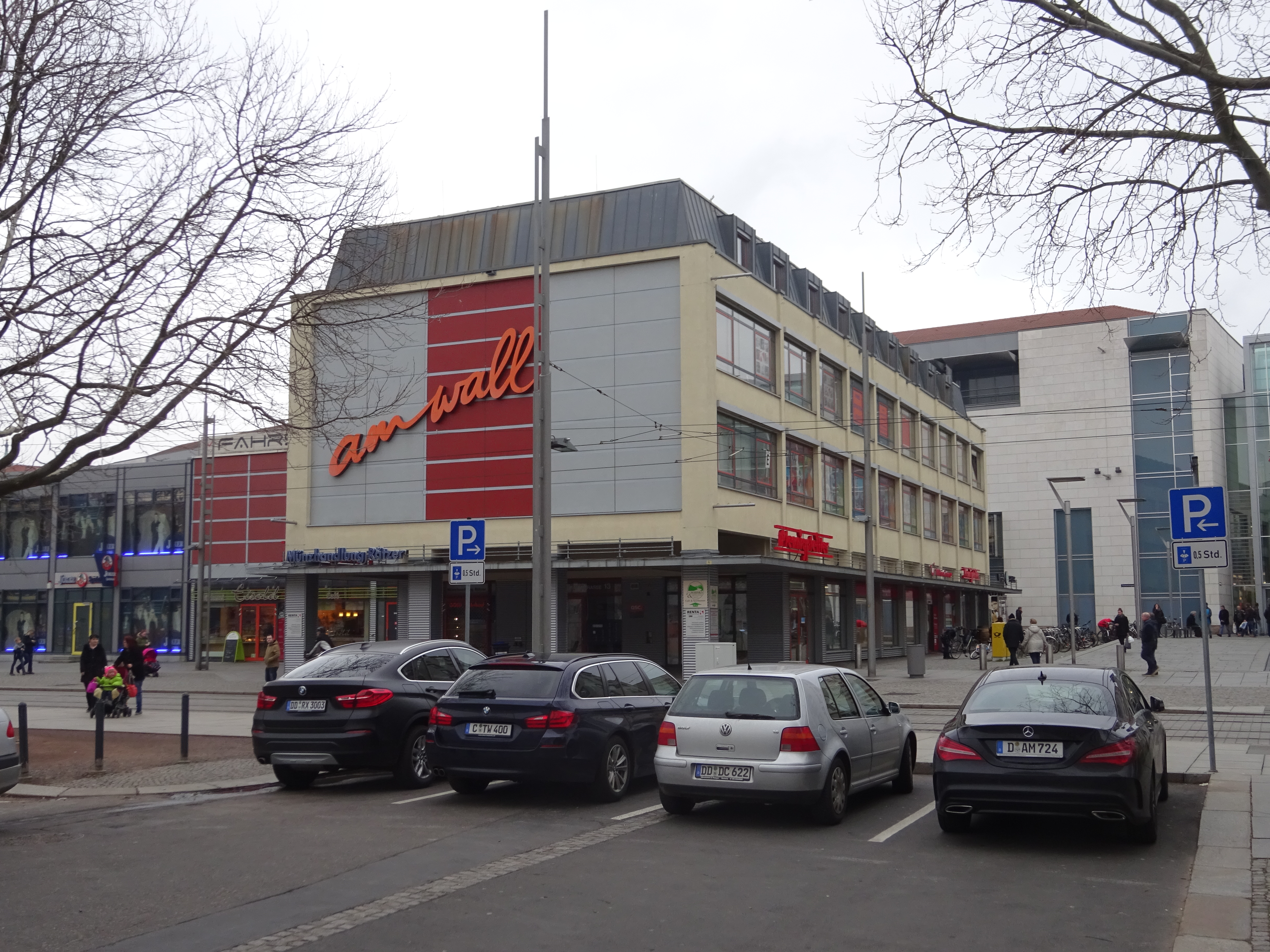 ehem. Kinderkaufhaus an der Webergasse, heute Teil der Ladenzeile "Am Wall"